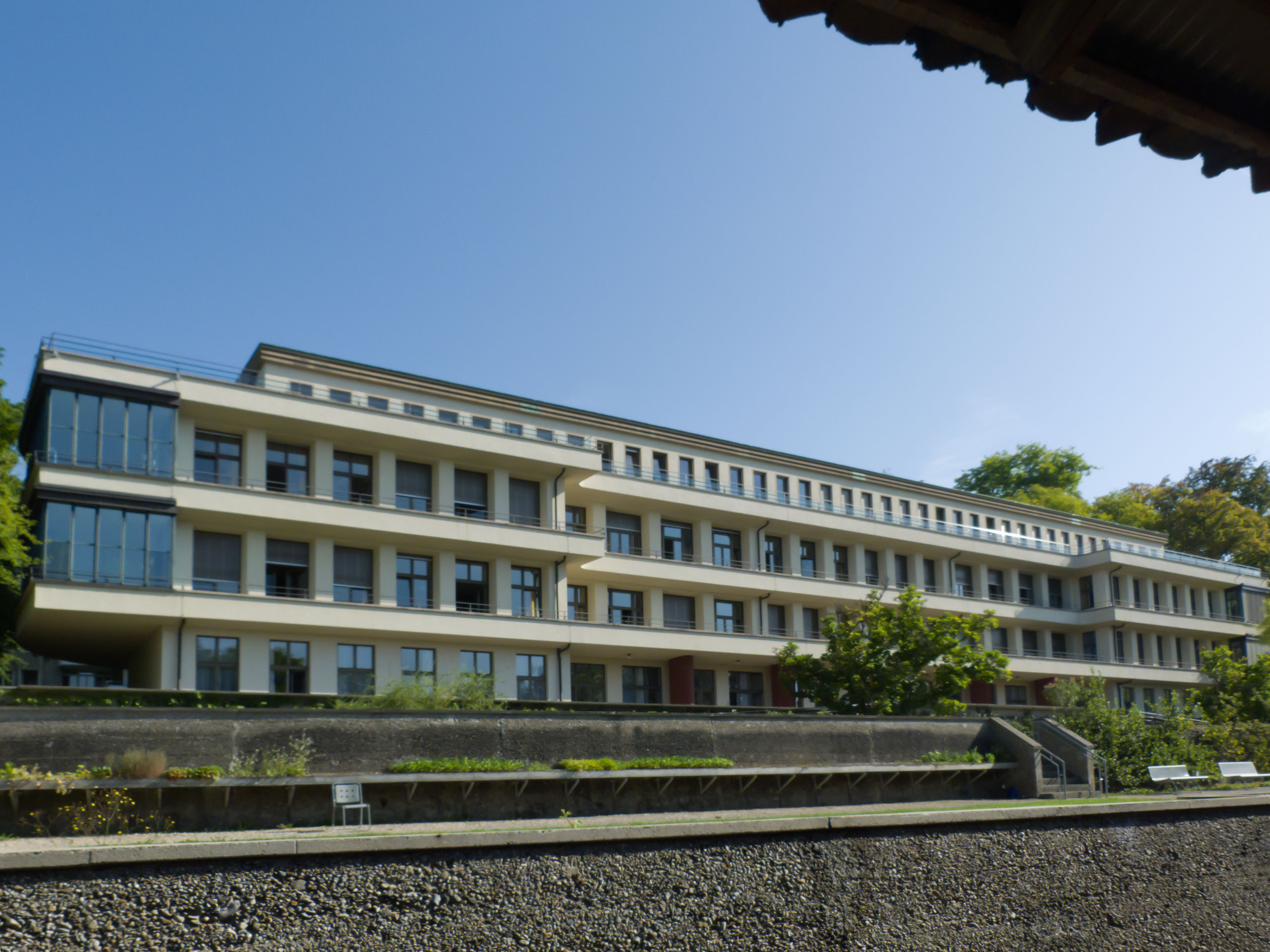 Lory-Spital, Südfassade. Erbaut von Architekt O.R.Salvisberg